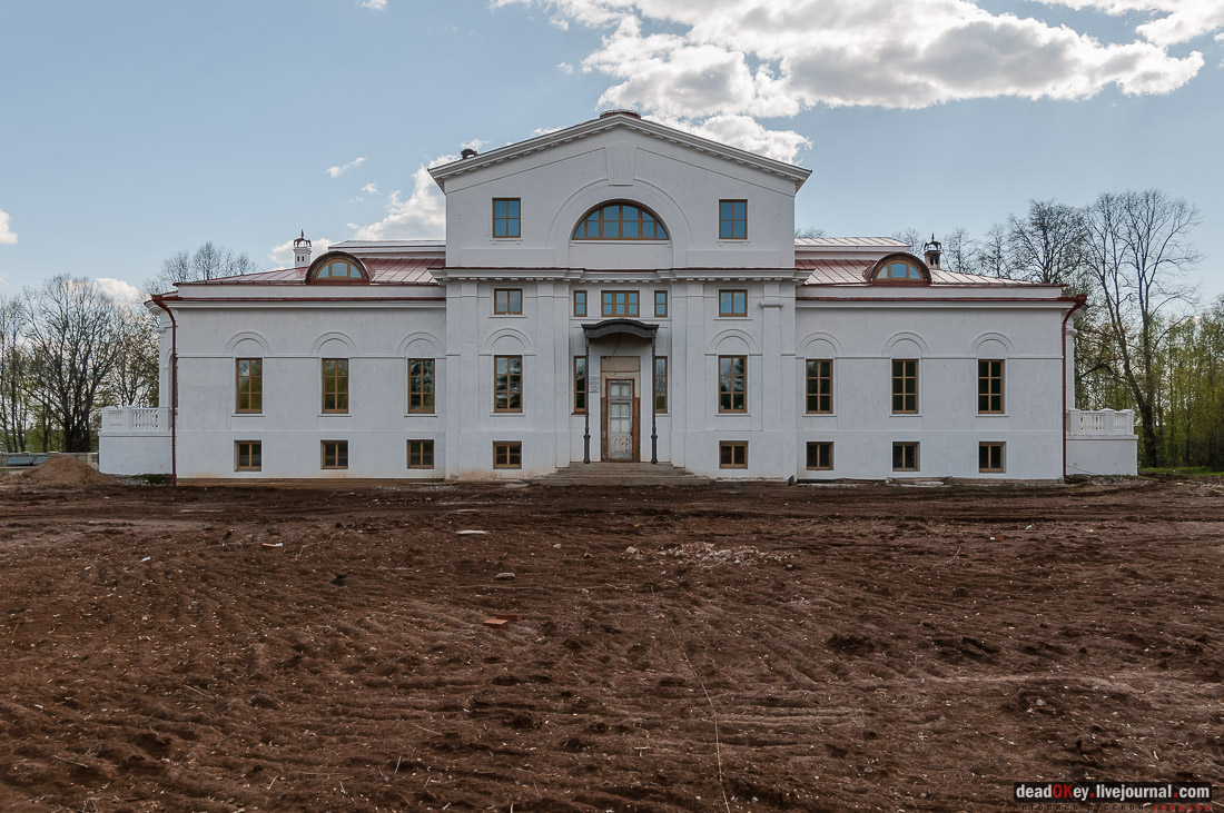 Северный фасад усадьбы Студеные ключи